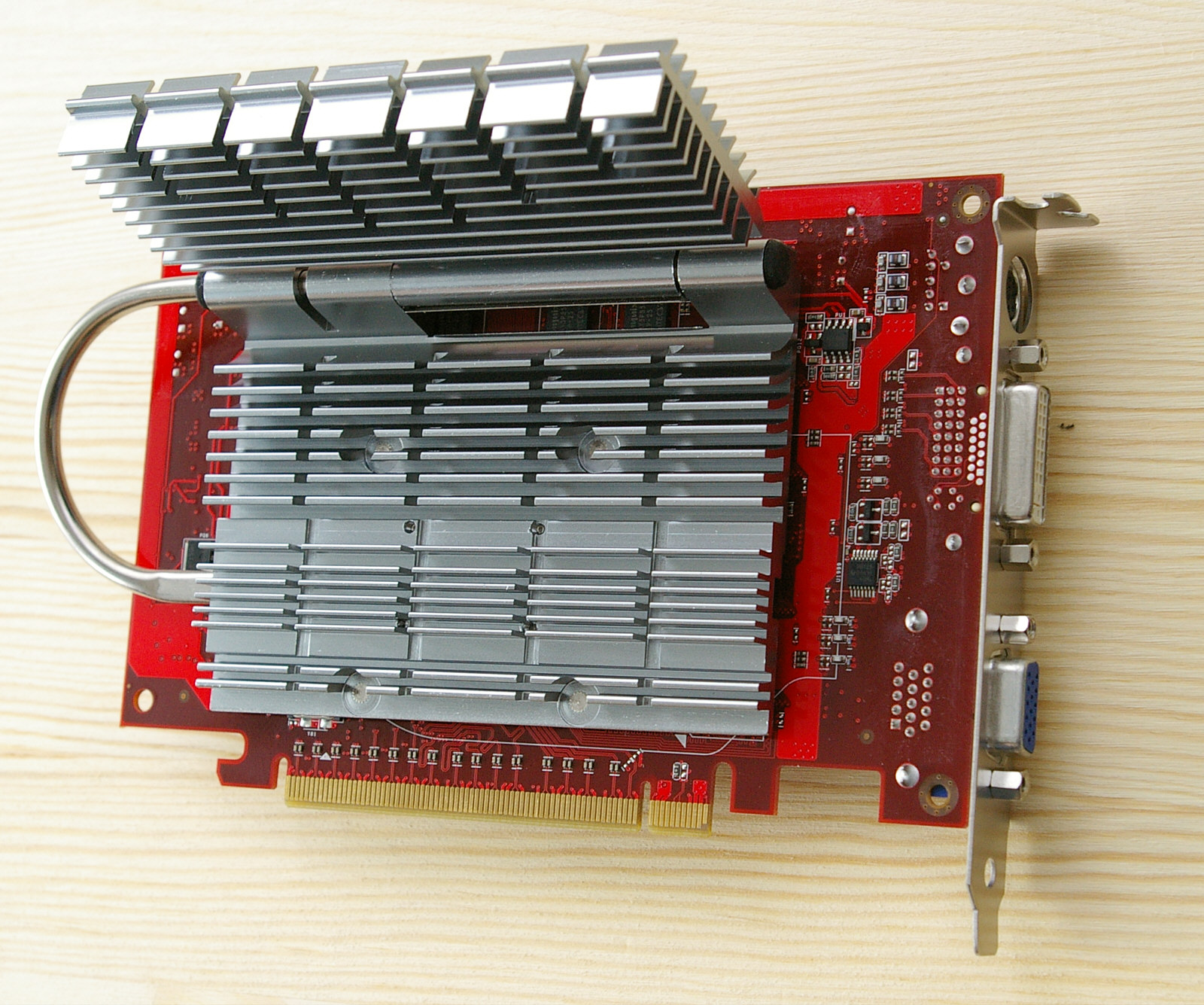 Lüfterlos gekühlte Grafikkarte Asus EAX1300pro. Um die hohe Verlustleistung moderner Grafikprozessoren abführen zu können, ist bei diesem Modell der Grafikchip samt Hauptkühler auf der "Rückseite" der PCIe-Karte angeordnet. Ein Teil des Kühlkörpers ist mit einer Heatpipe mit dem Grundkühler thermisch verbunden und kann in den Luftstrom eines vorhandenen Gehäuselüfters geschwenkt werden bzw. profitiert (hoffentlich) vom Luftstrom des Prozessorlüfters oder des Netzteillüfters.